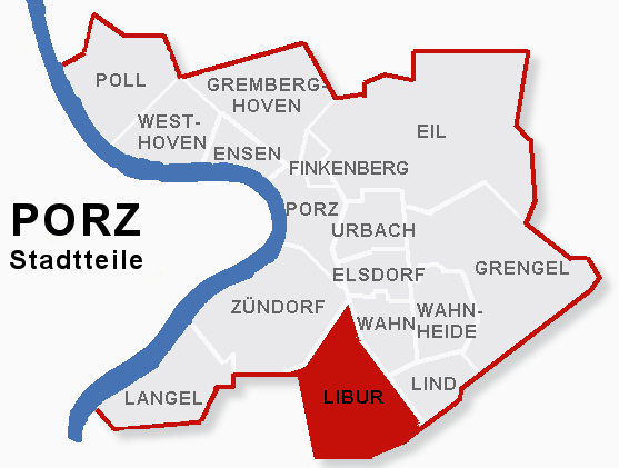 Lage des Stadtteils Libur im Stadtbezik Porz